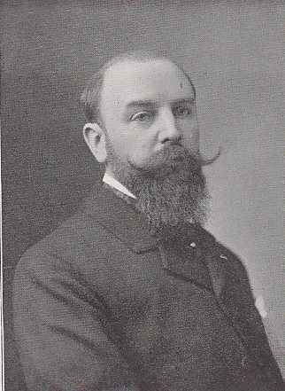 Gustave Vautrey, photographie imprimée de 1902